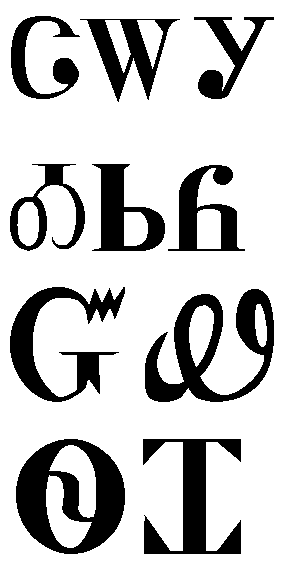 Beispiele für die Cherokee-Schrift Beschreibung: Beispiele für die Cherokee-Schrift von Sequoyah Quelle: selbst erstellt --Immanuel Giel 16:56, 27. Jan 2005 (CET) (für die GNU FDL)